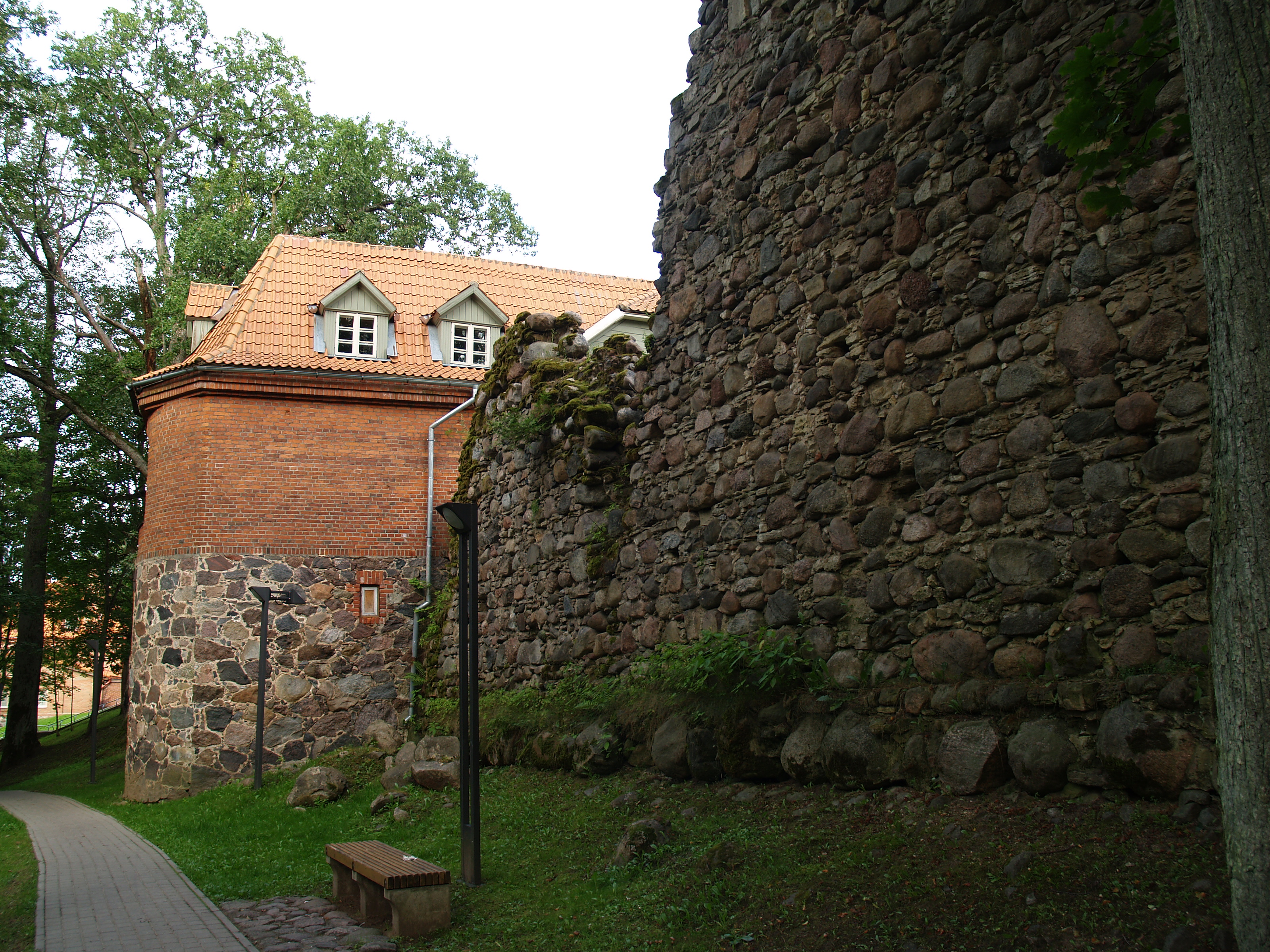 Valmiera linnusevaremed